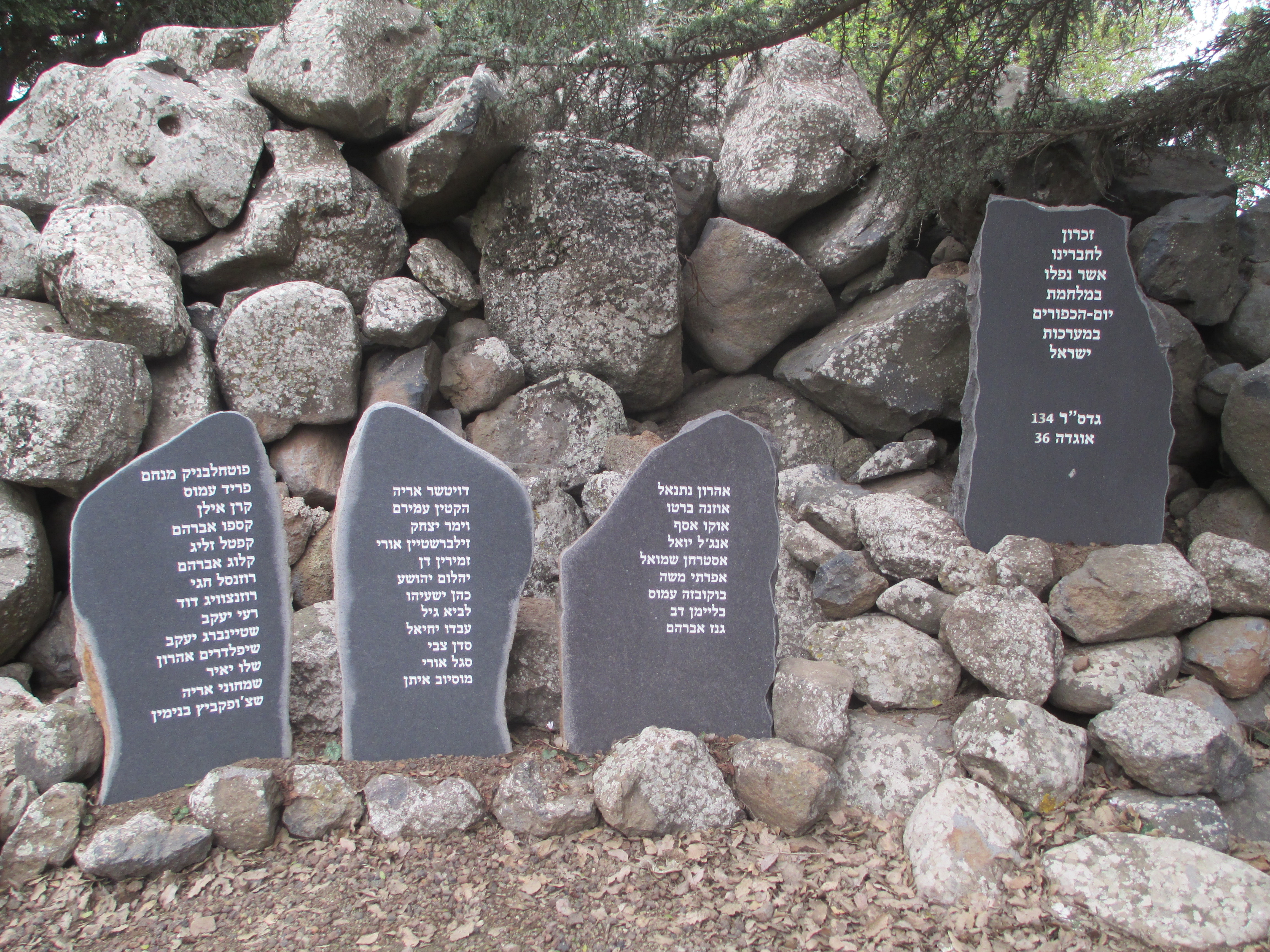 אנדרטת גדס"ר 134 בגולן